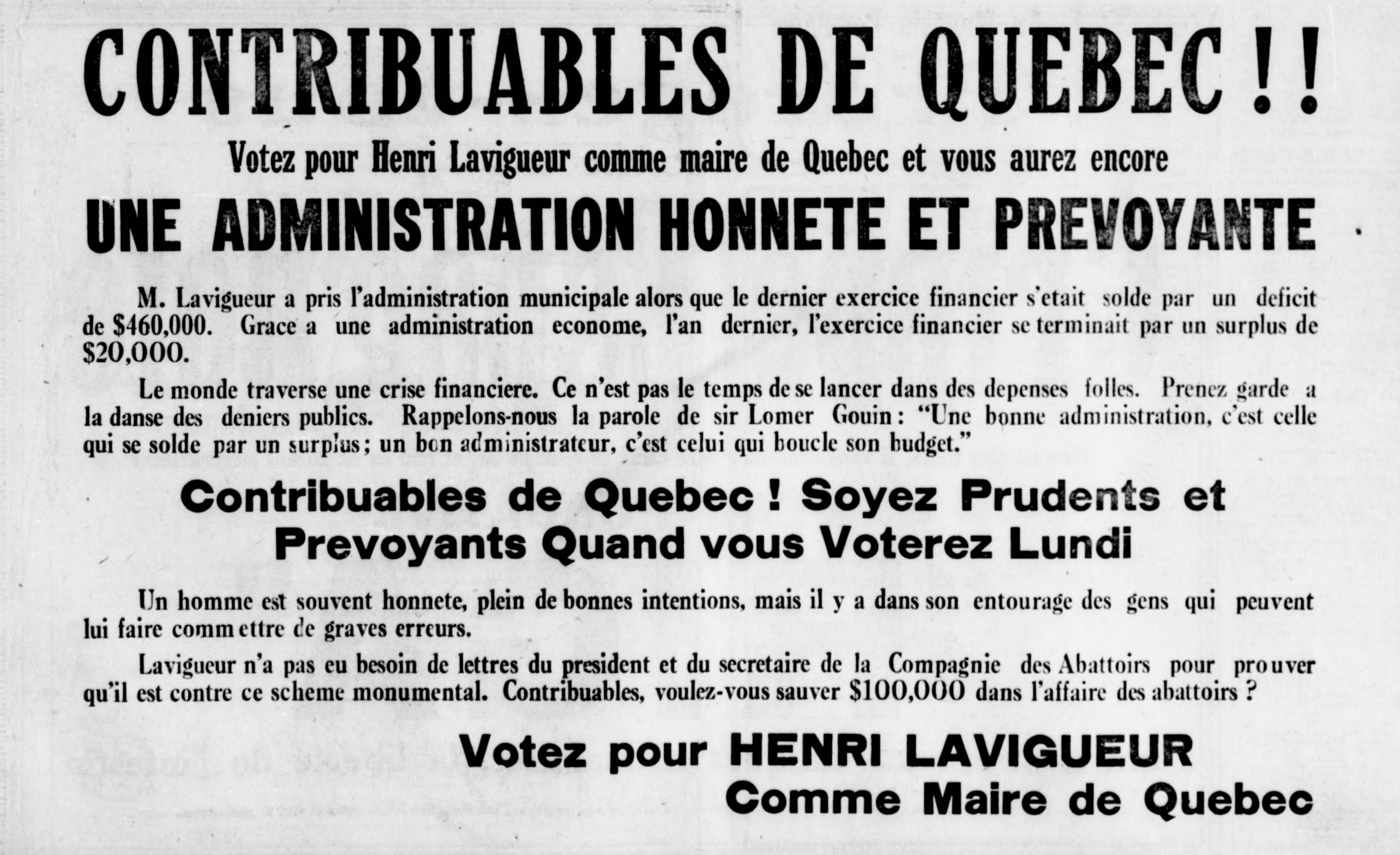 Publicité électorale d'Henri Lavigueur, lors des élections municipales de 1920 à Québec, publiée dans l'édition du 14 février 1920 du journal Le Soleil.